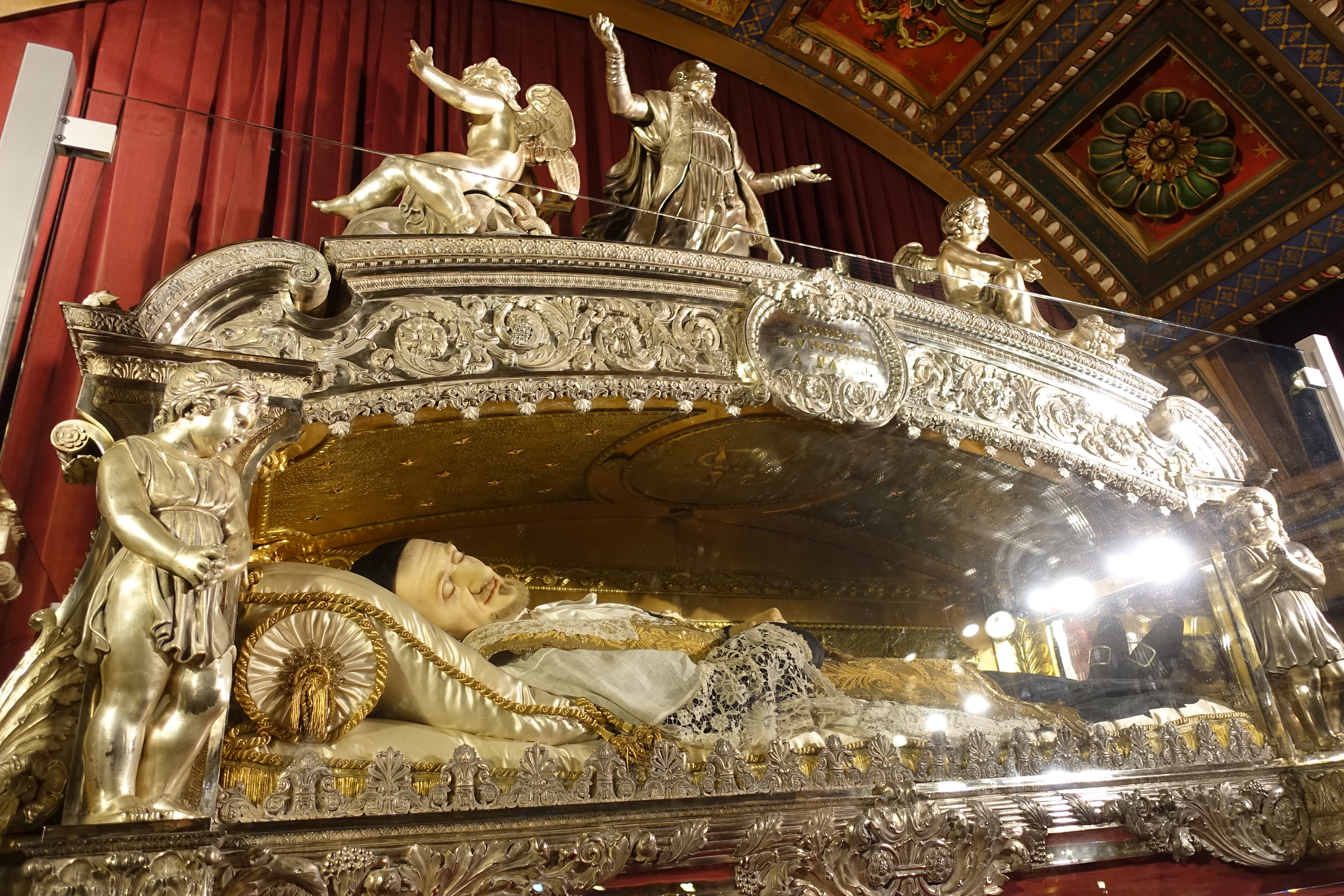 Tomb of Saint-Vincent @ Chapelle Saint-Vincent-de-Paul @ Paris